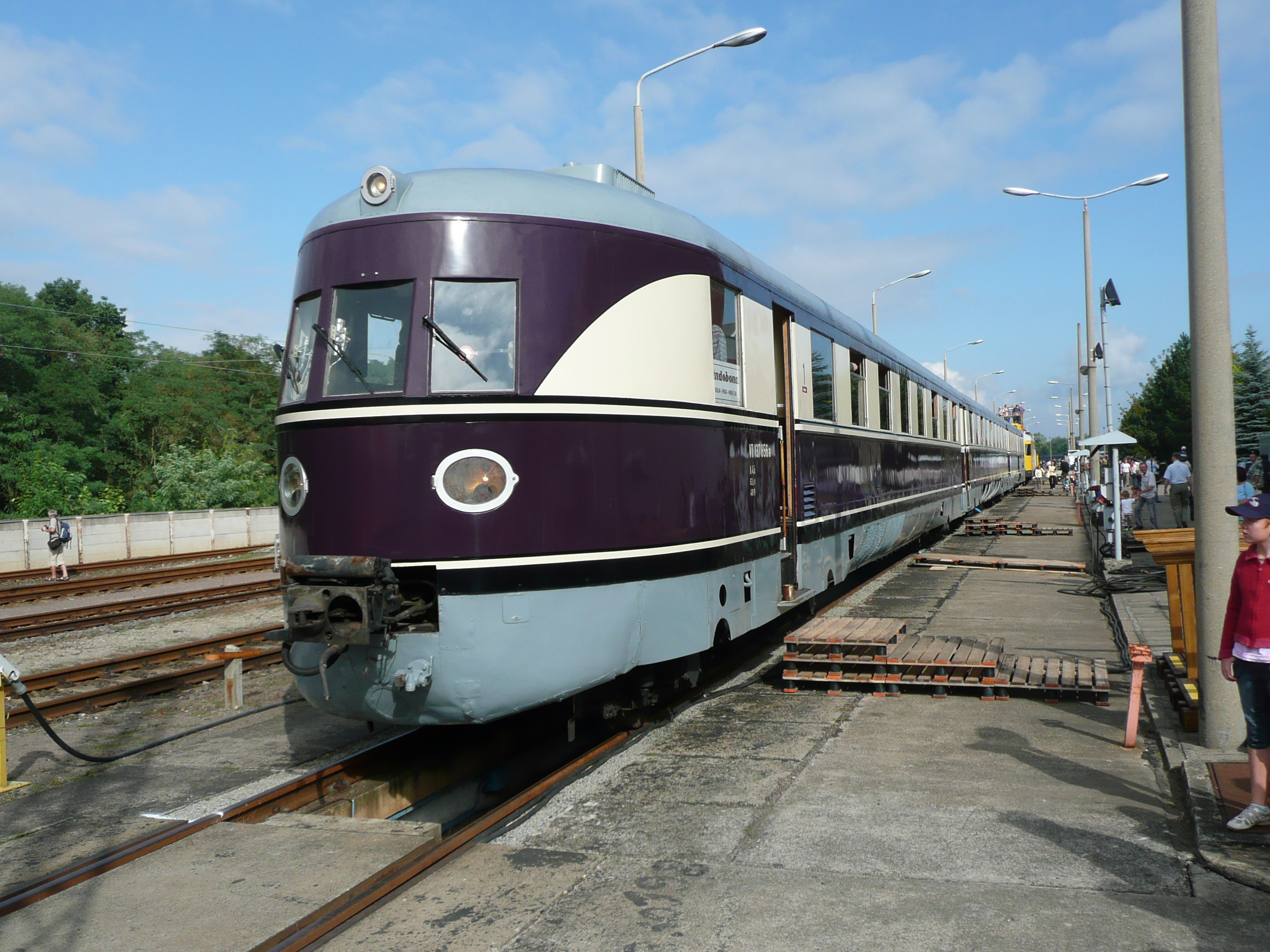 SVT 137.856 im Ausbesserungswerk Delitzsch